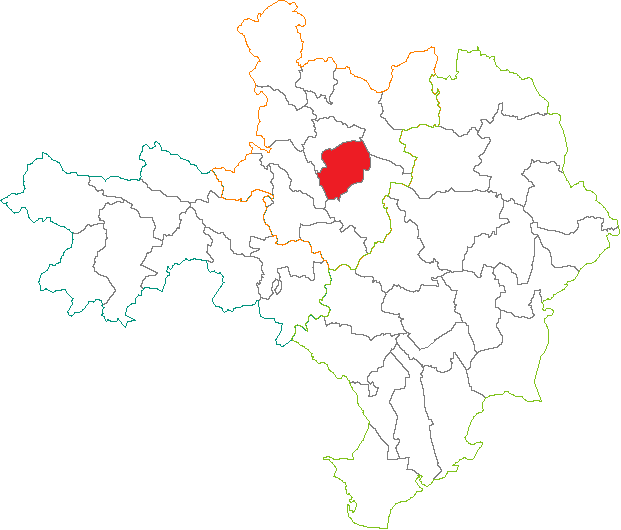 Situation du canton dans le département du Gard (France)